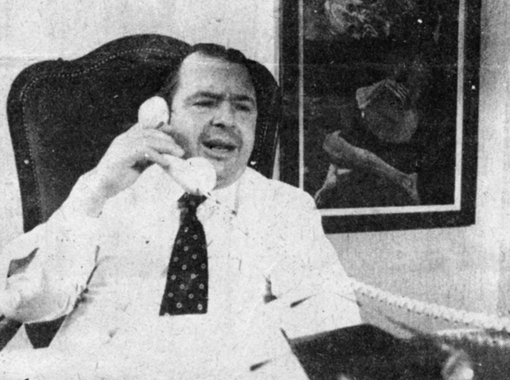 Fotografía del Dr. José Garcia Cugat